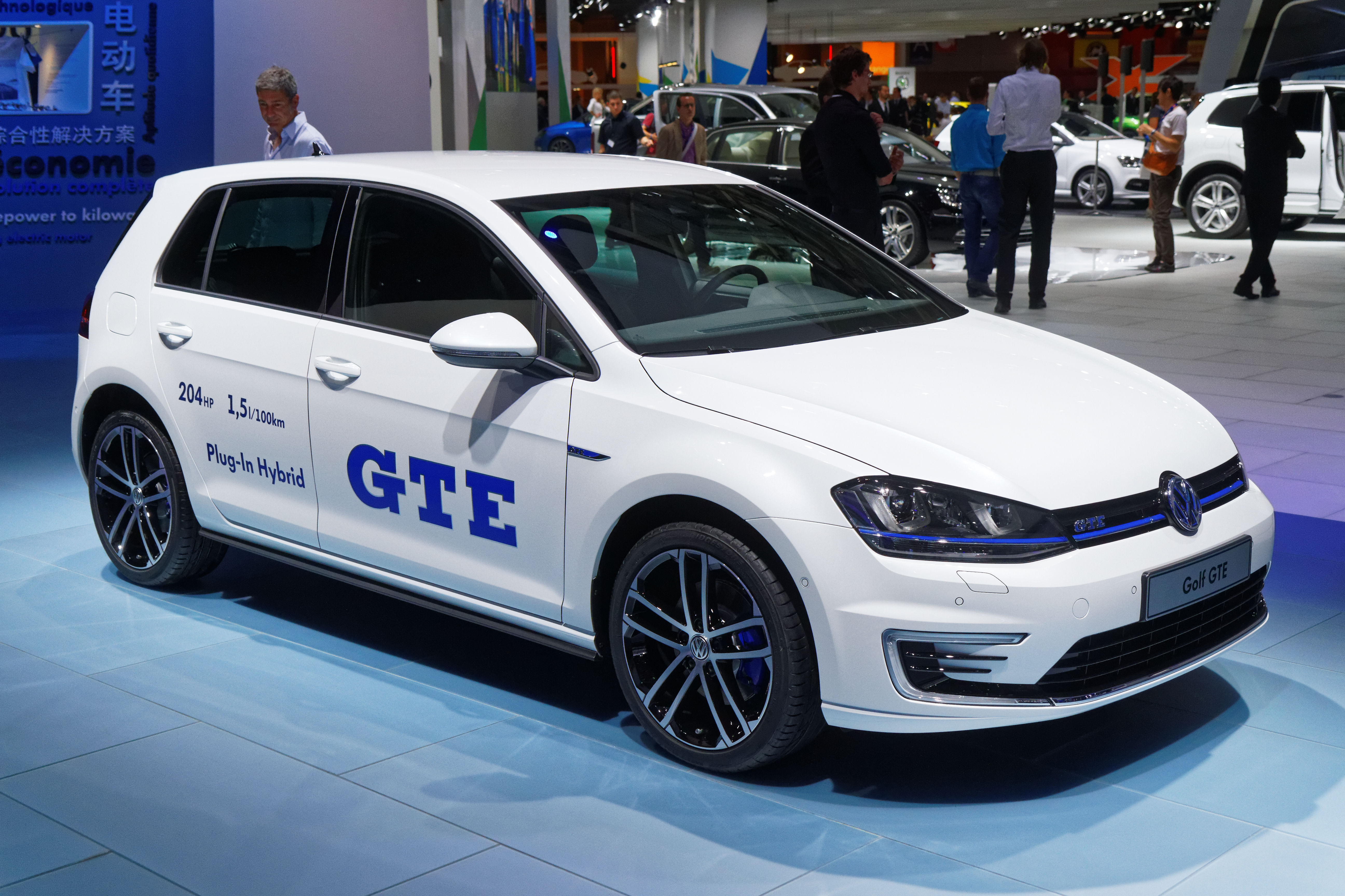 Une Volkswagen Golf GTE présentée lors du mondial de l'automobile de Paris 2014.